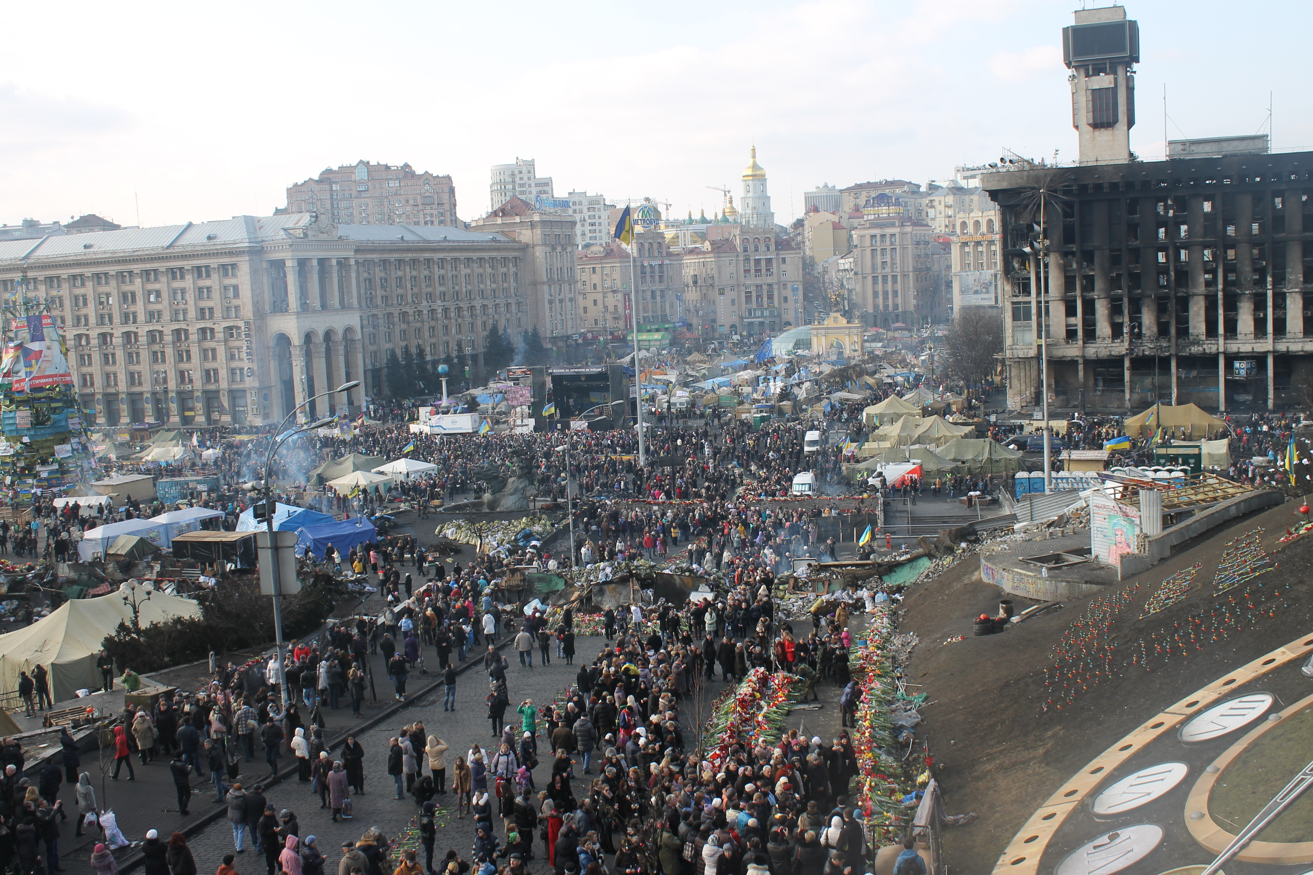 Вшанування пам'яті загиблих у центрі Києва, 24.02.2014